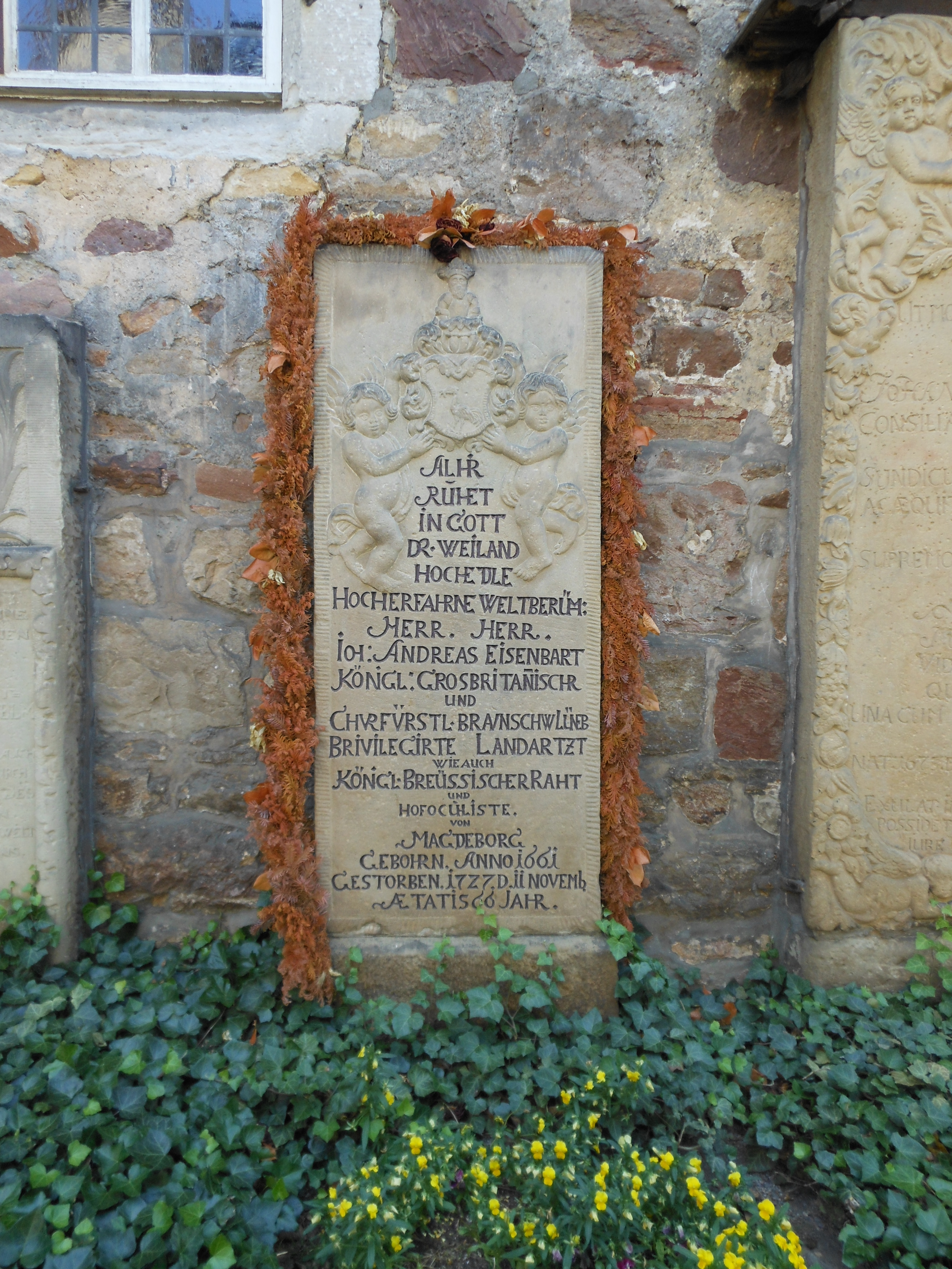 Hann. Münden, St.-Ägidien-Kirche, Südwand, Epitaph Johann Andreas Eisenbarth